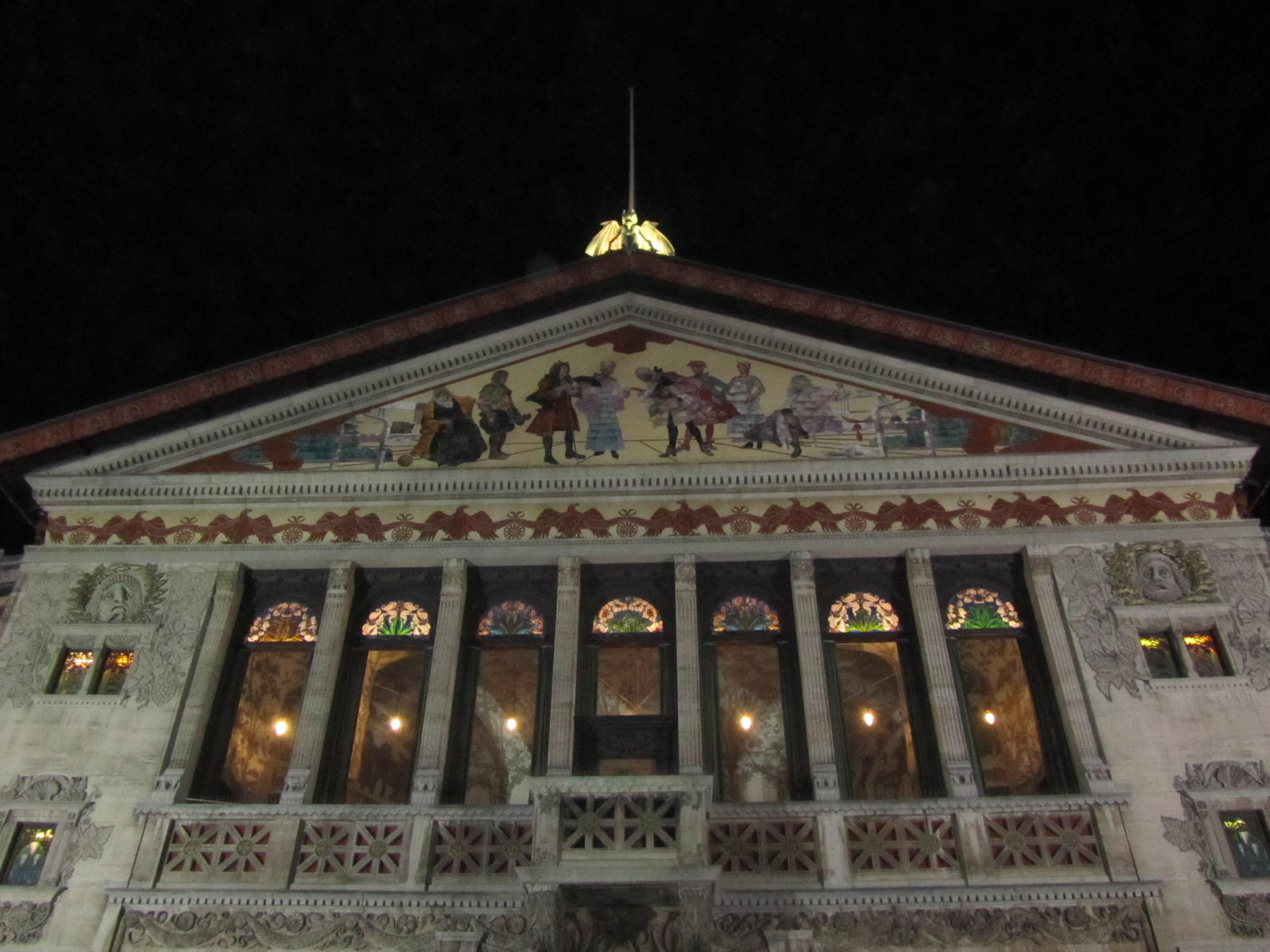 Aarhus´i teater